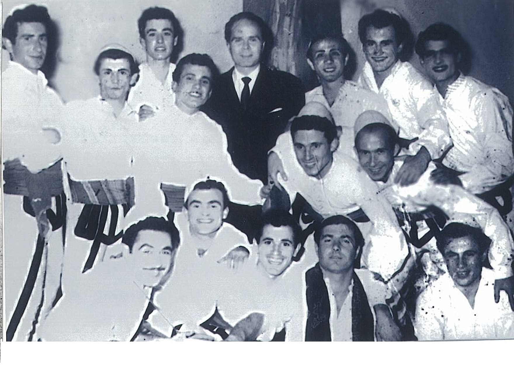 Foto te ndryshme nga jeta e Panajot Kanaçit